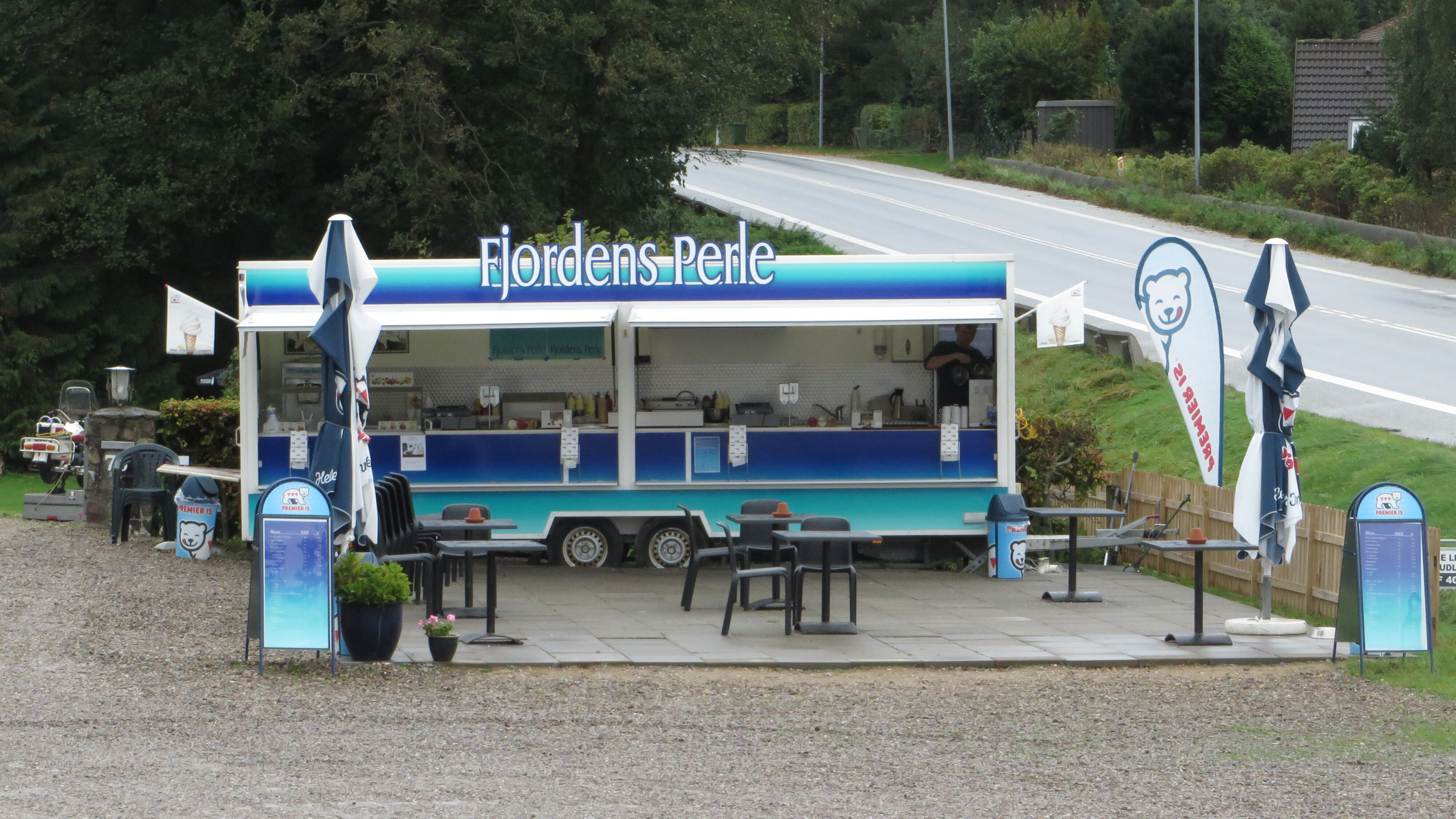 Konkurrenz zu Annies Kiosk, die Fjordens Perle 2014, Bild 007